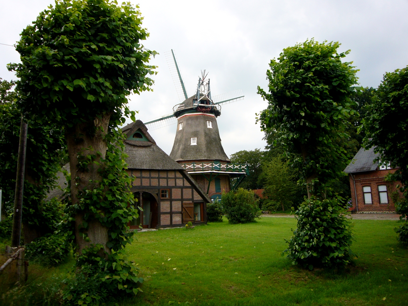 Holländerwindmühle in Heise, Gemeinde Hollen im Landkreis Cuxhaven